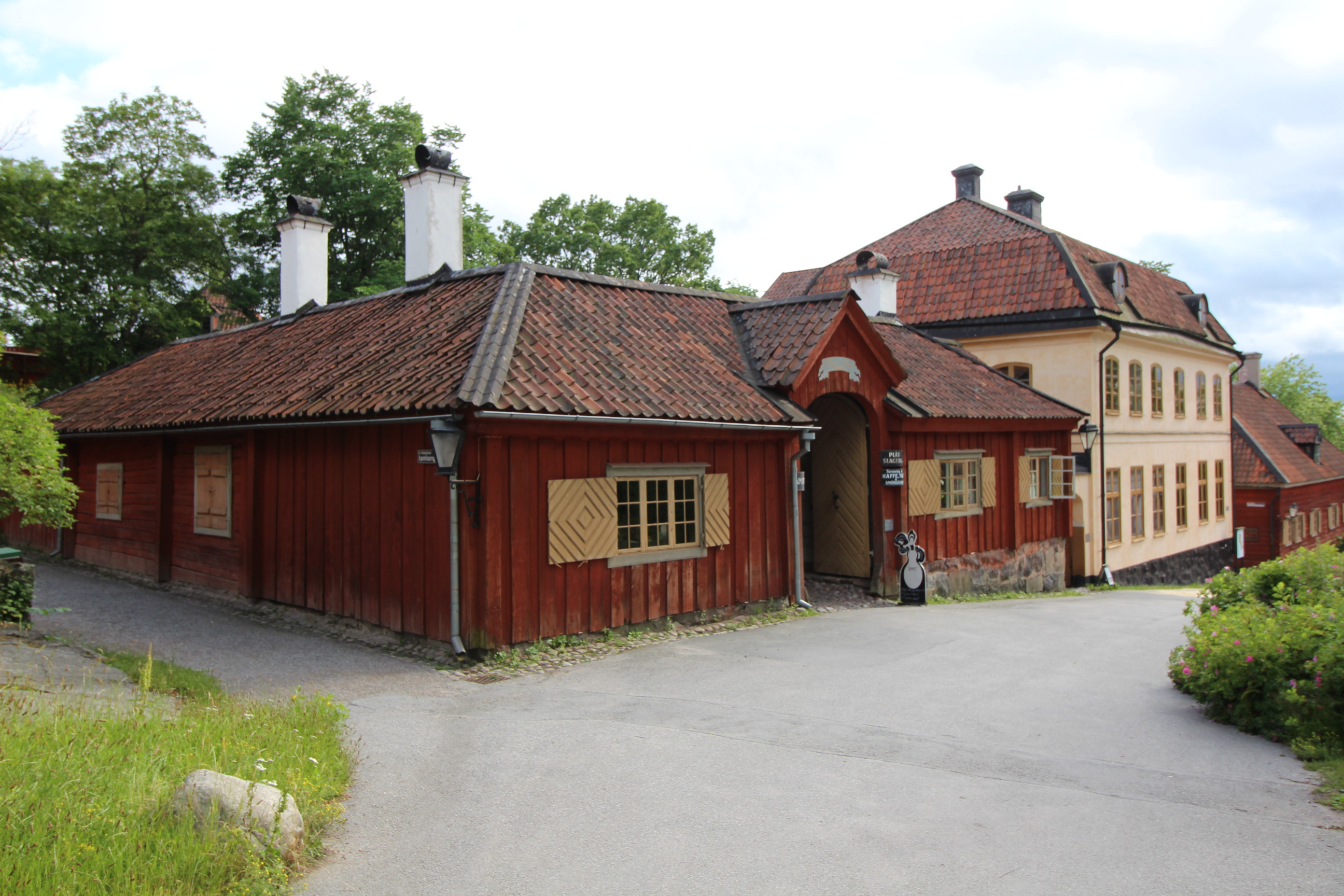 Petissan, historisk kafébyggnad i stadskvarteret på Skansen i Stockholm